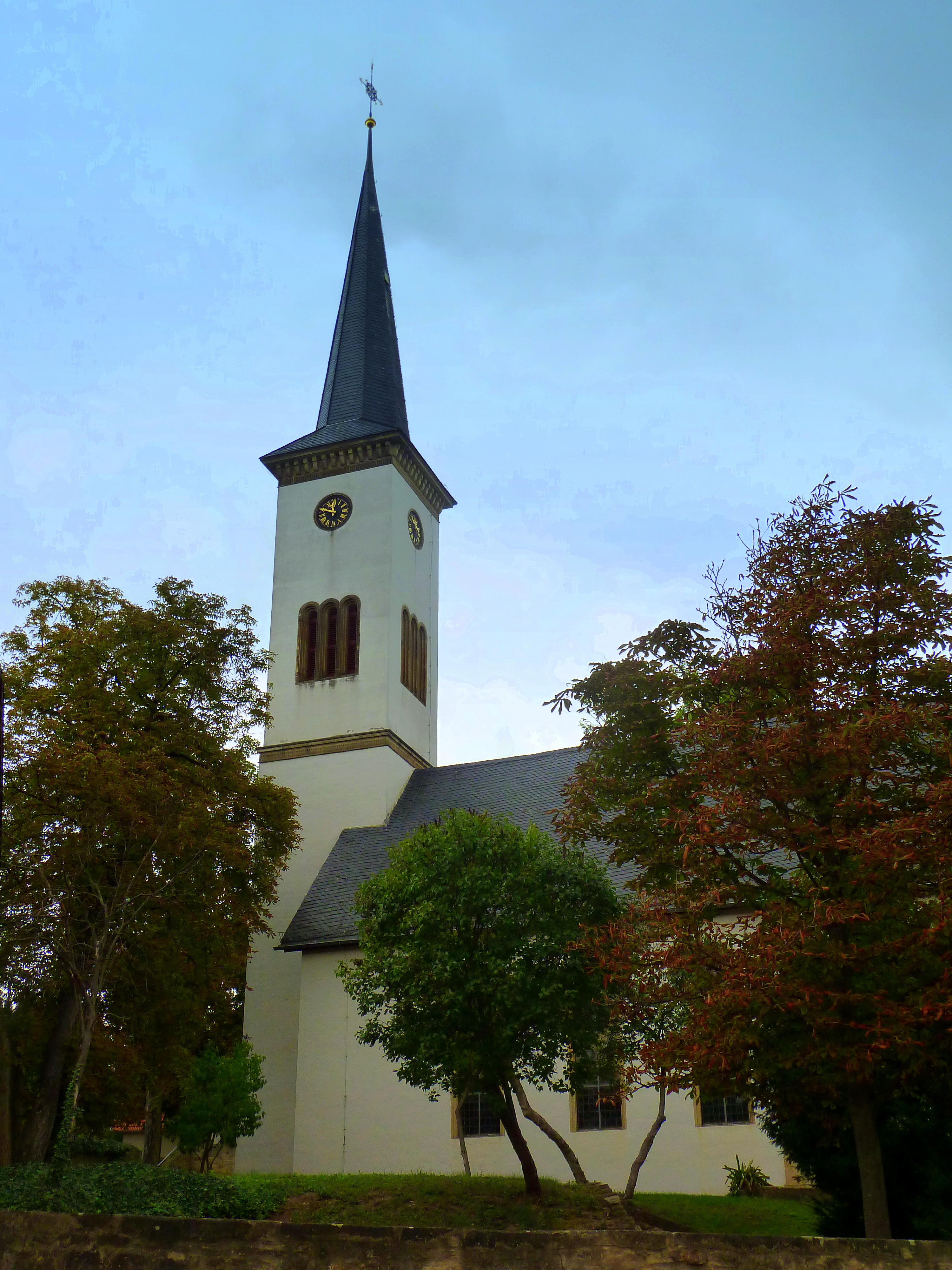 Evangelische Kirche in Flonheim-Uffhofen – erbaut um 1756